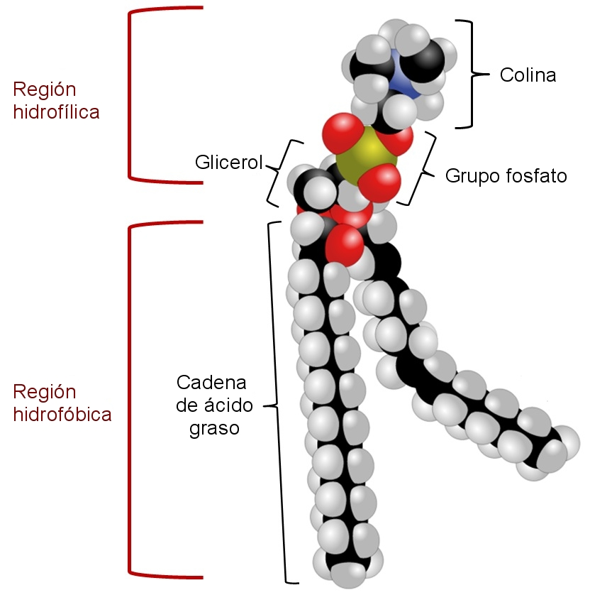 Estructura de la fosfatidilcolina con un extremo hidrófilo y otro hidrófobo